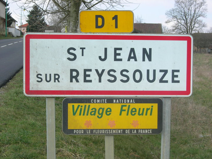 Entrée du village de Saint Jean sur Reyssouze.